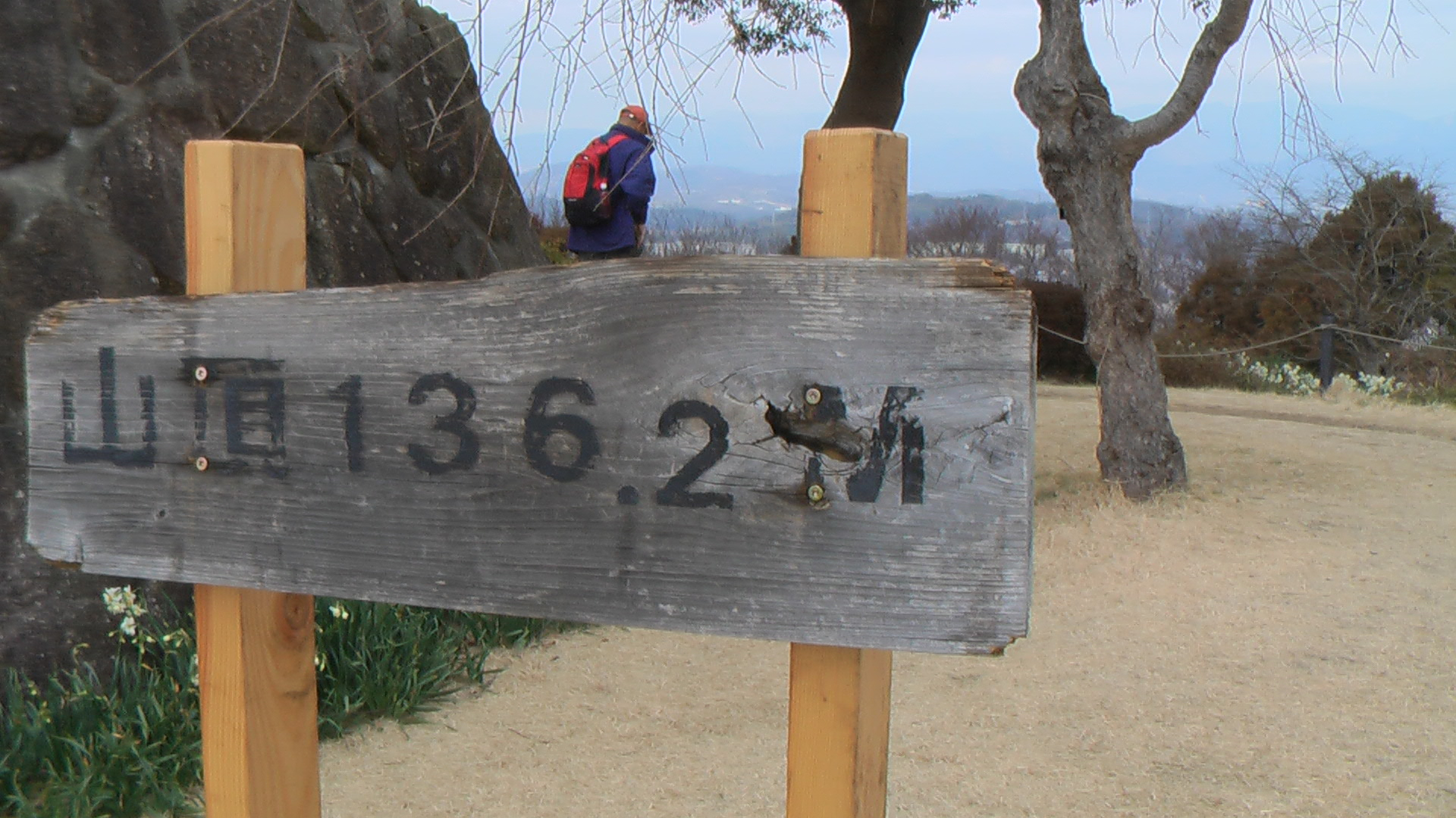 吾妻山頂上の標高板です。